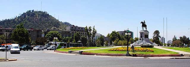 Vista de la plaza baquedano hacia el norte.